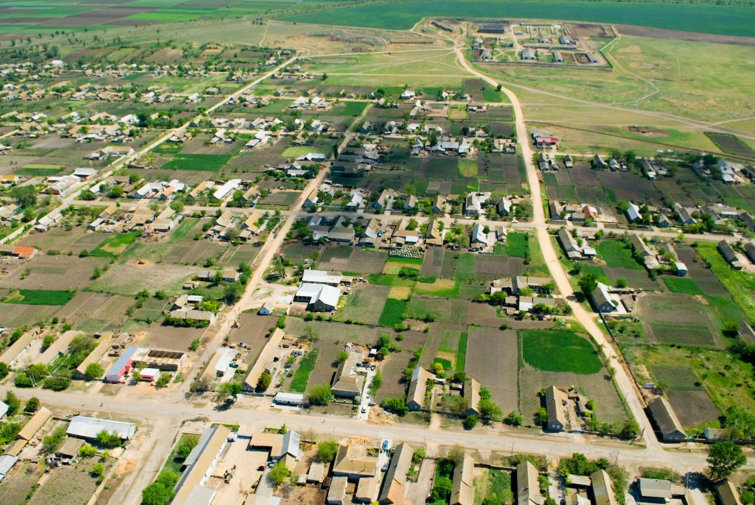 Юго-восточная часть села